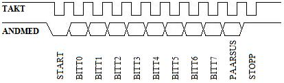 Liinikood ja taktsignaal andmeedastusel PS/2 liidese kaudu sisendseadmest arvutisse.